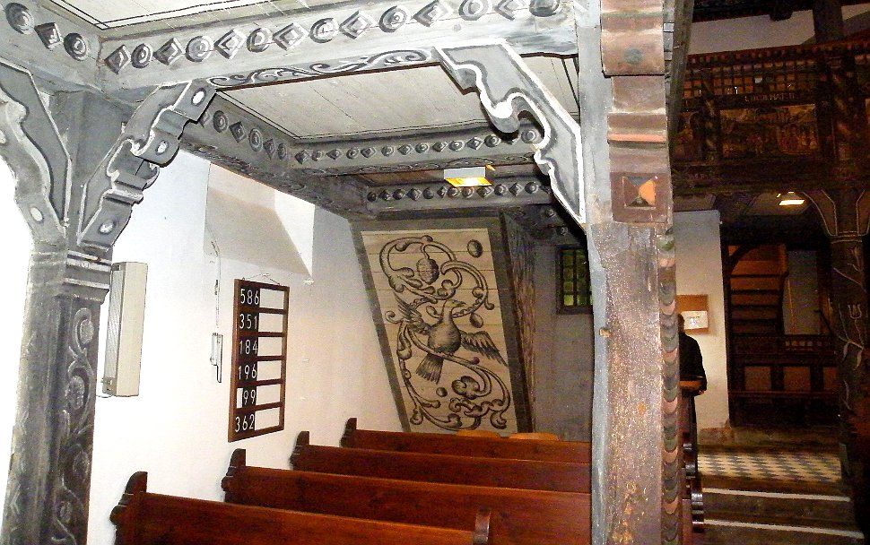 Detail der Innenmalerei von Magnus Boischuh 1676